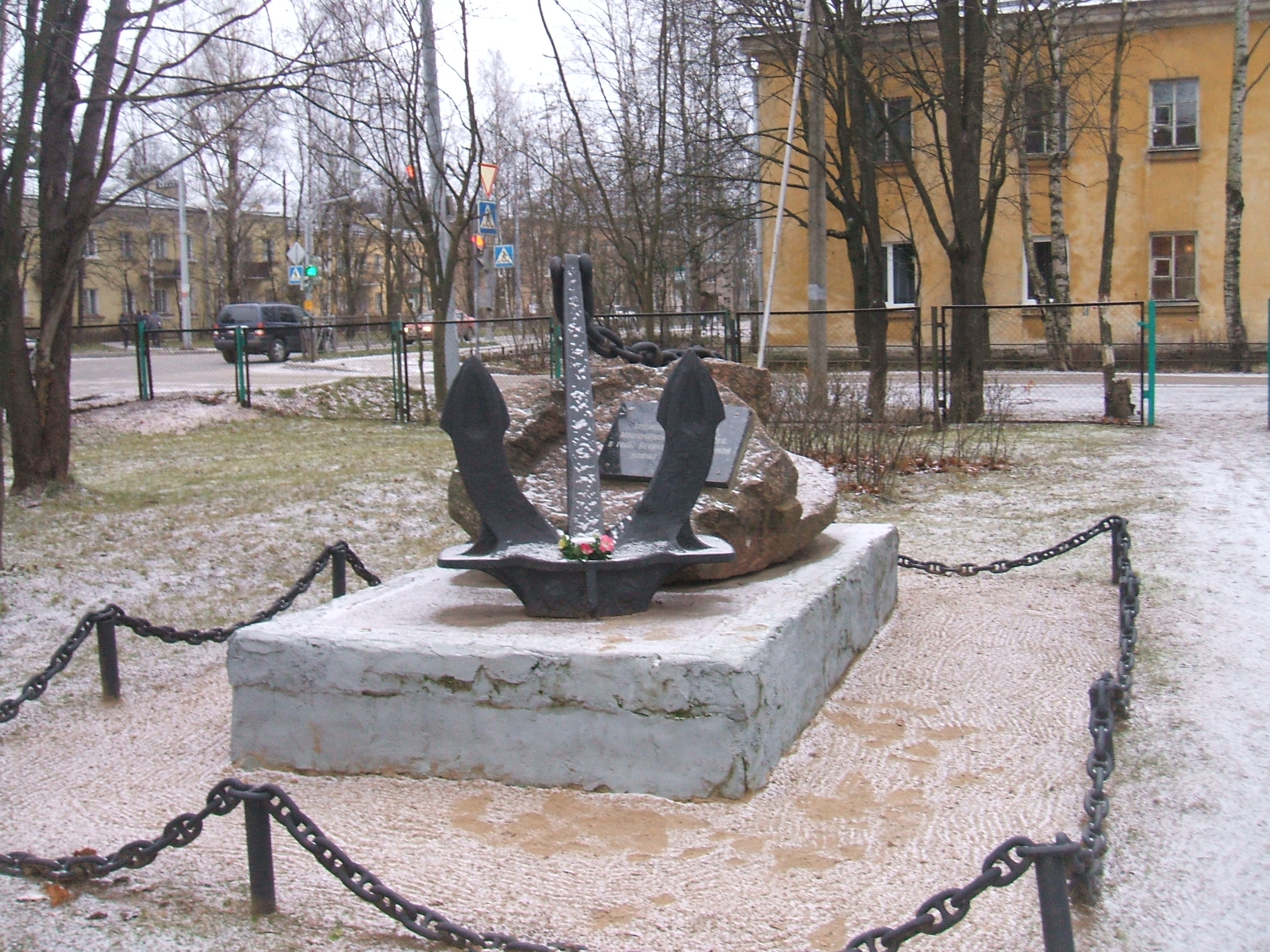 Памятник защитникам Моондзунского архипелага установленынй у школы № 437 п. Песочный Курортного района СПб